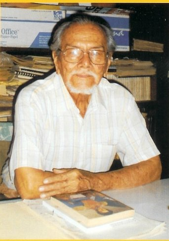 Herminio Chávez Guerrero